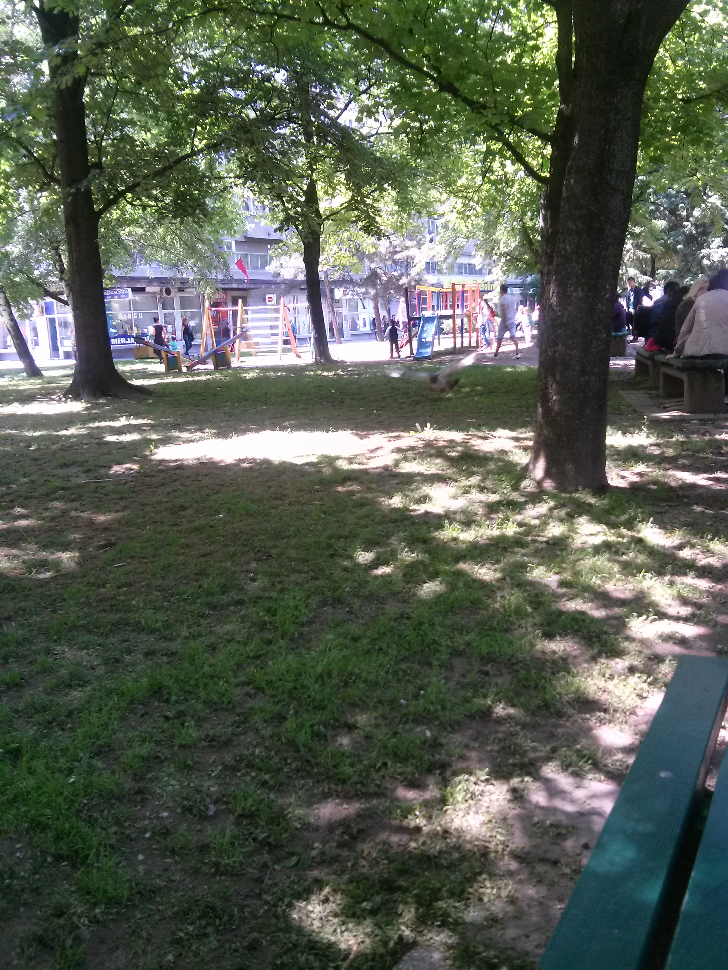 Srpski (latinica): Gradski park Leskovac